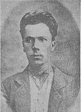 Иван Фёдорович Окладский - член партии "Народная воля", агент Департамента полиции